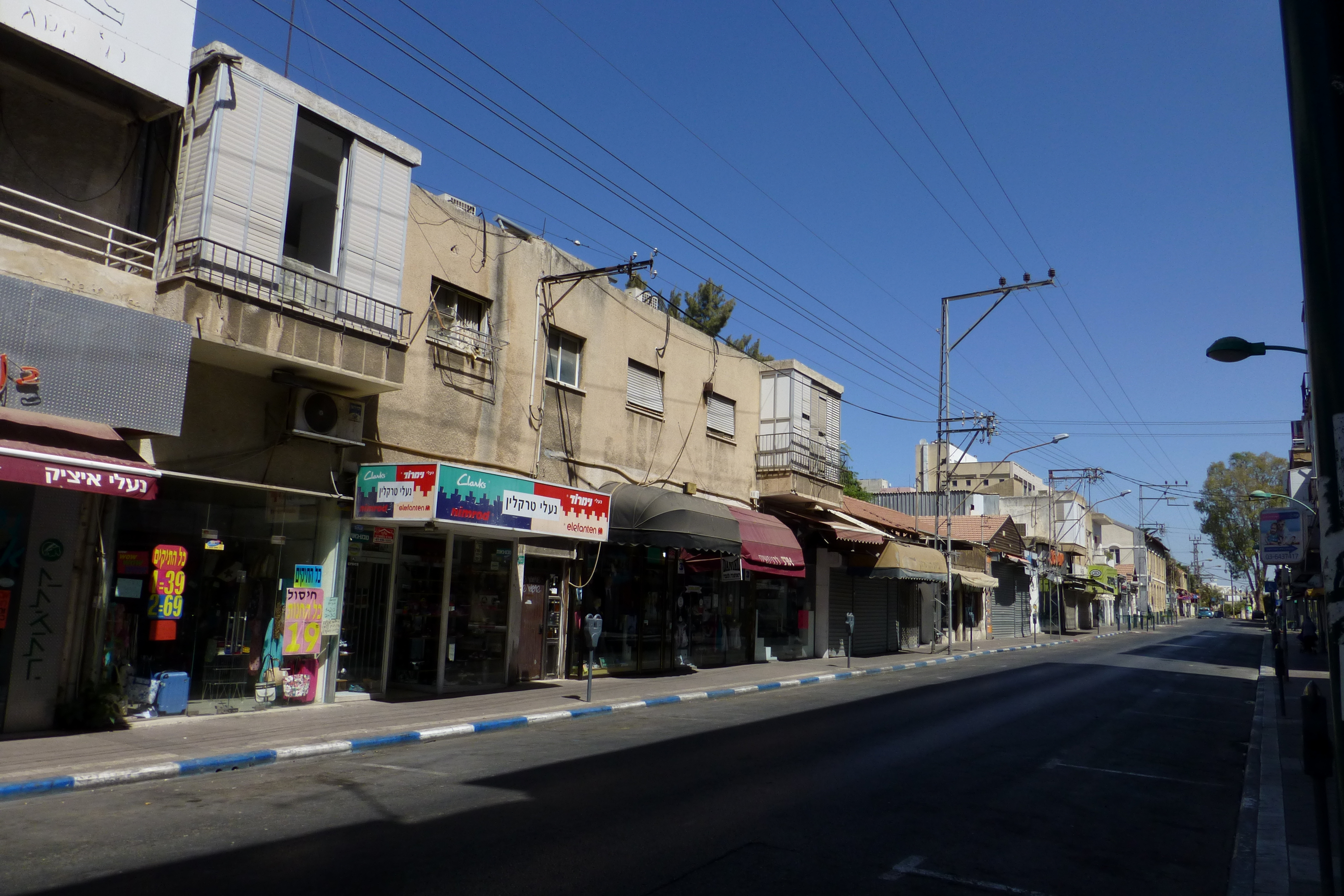 ביתו של צבי גרף, שהקים בשנת 1901 את שירות הדיליז'נסים בפתח תקווה.